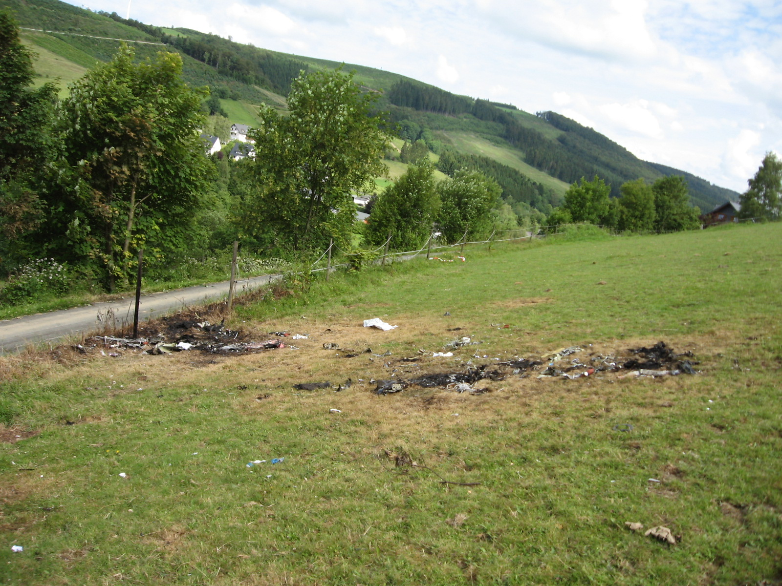 Trümmer des Learjet 35 Absturzes bei Olberg-Elpe